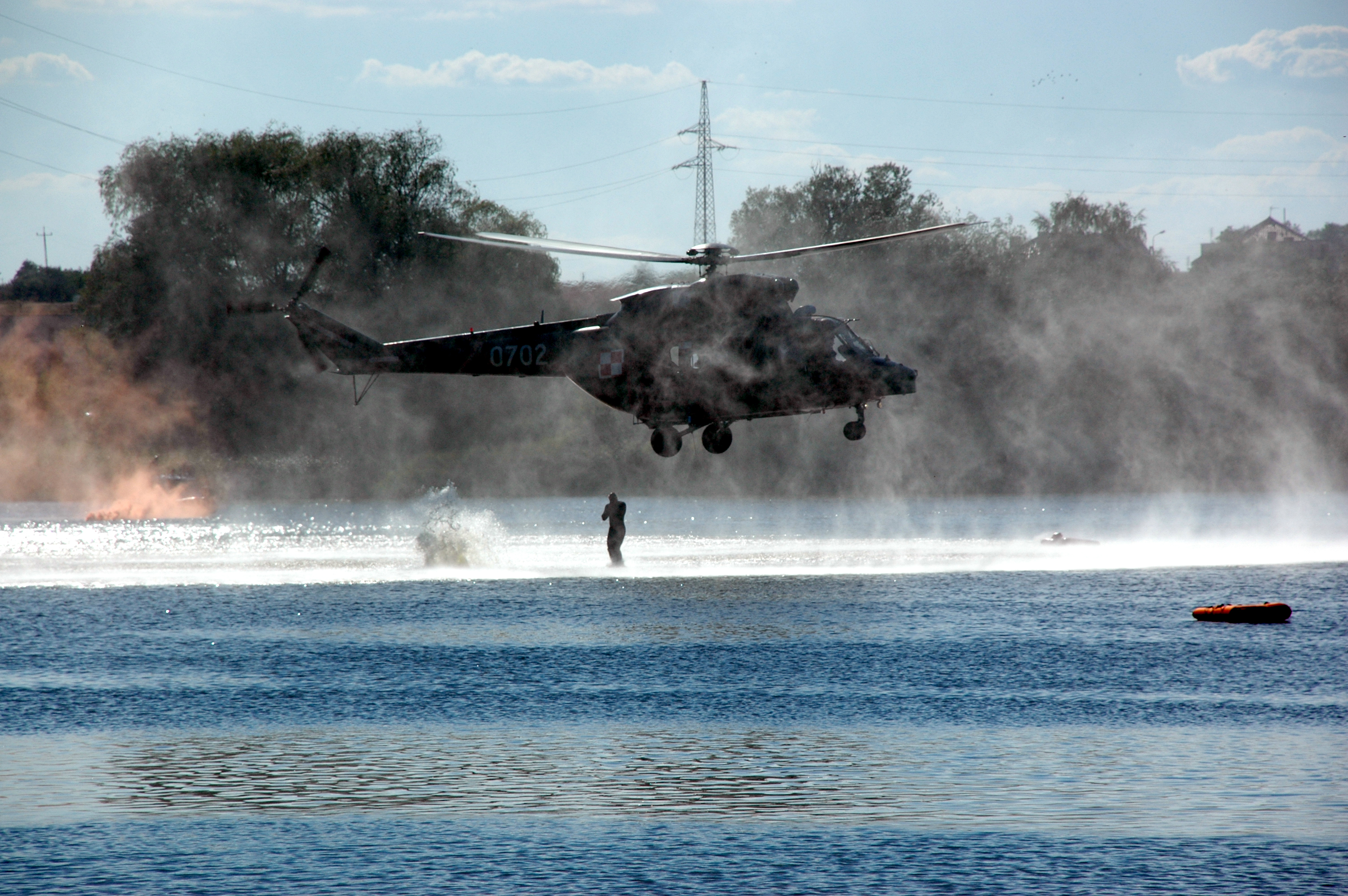 Desant ze śmigłowca do wody - Jezioro Żnińskie Małe